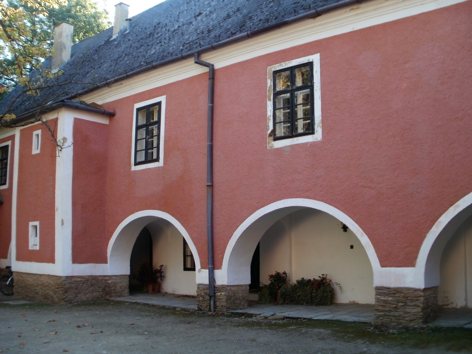 v. Sibrik kastély (Bozsok, Rákóczi Ferenc u. 1 .) This is a photo of a monument in Hungary, Identifier: 8817